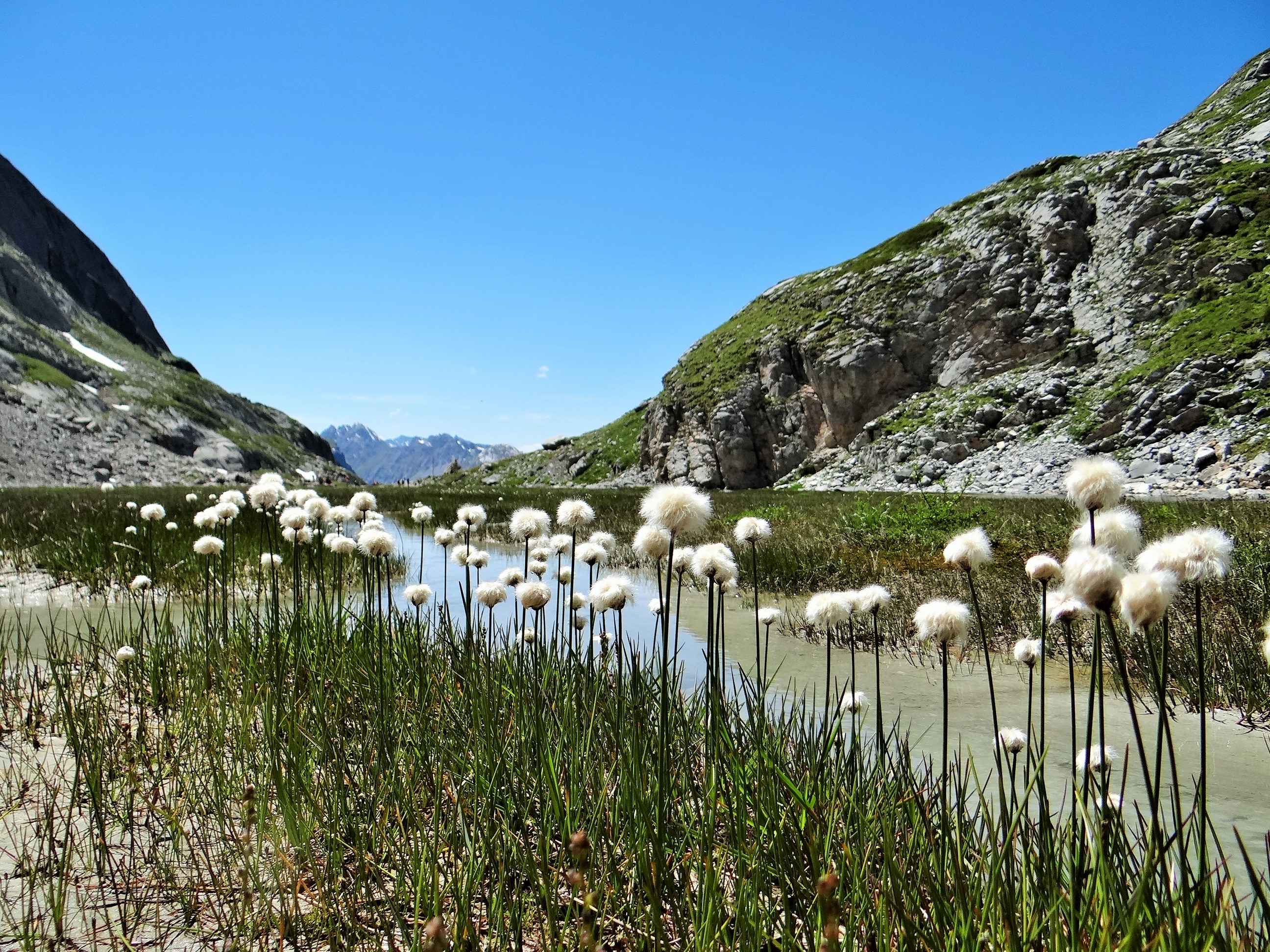 Parc national de la Vanoise